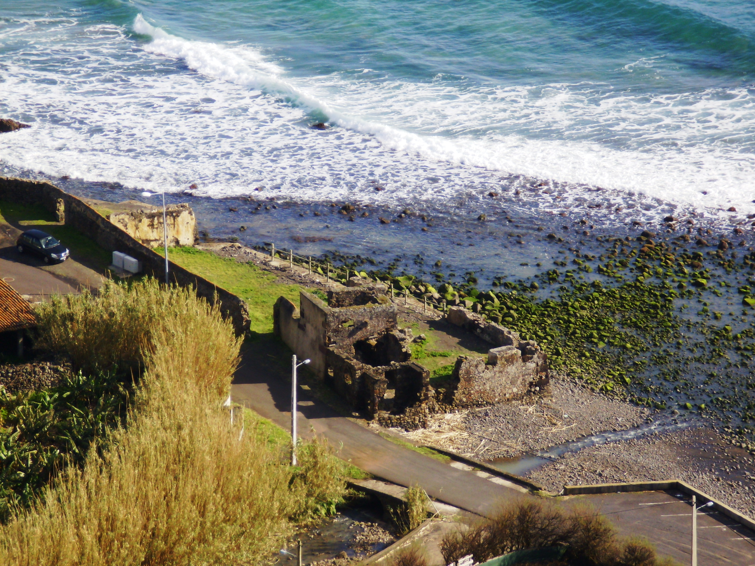 Forte de São João Baptista da Praia Formosa, freguesia da Almagreira, Ilha de Santa Maria, Açores: vista superior.